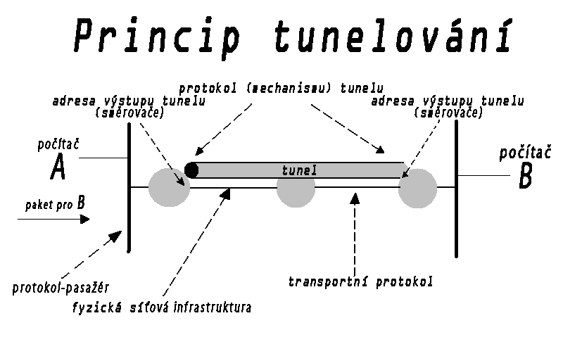 Princip síťového tunelování